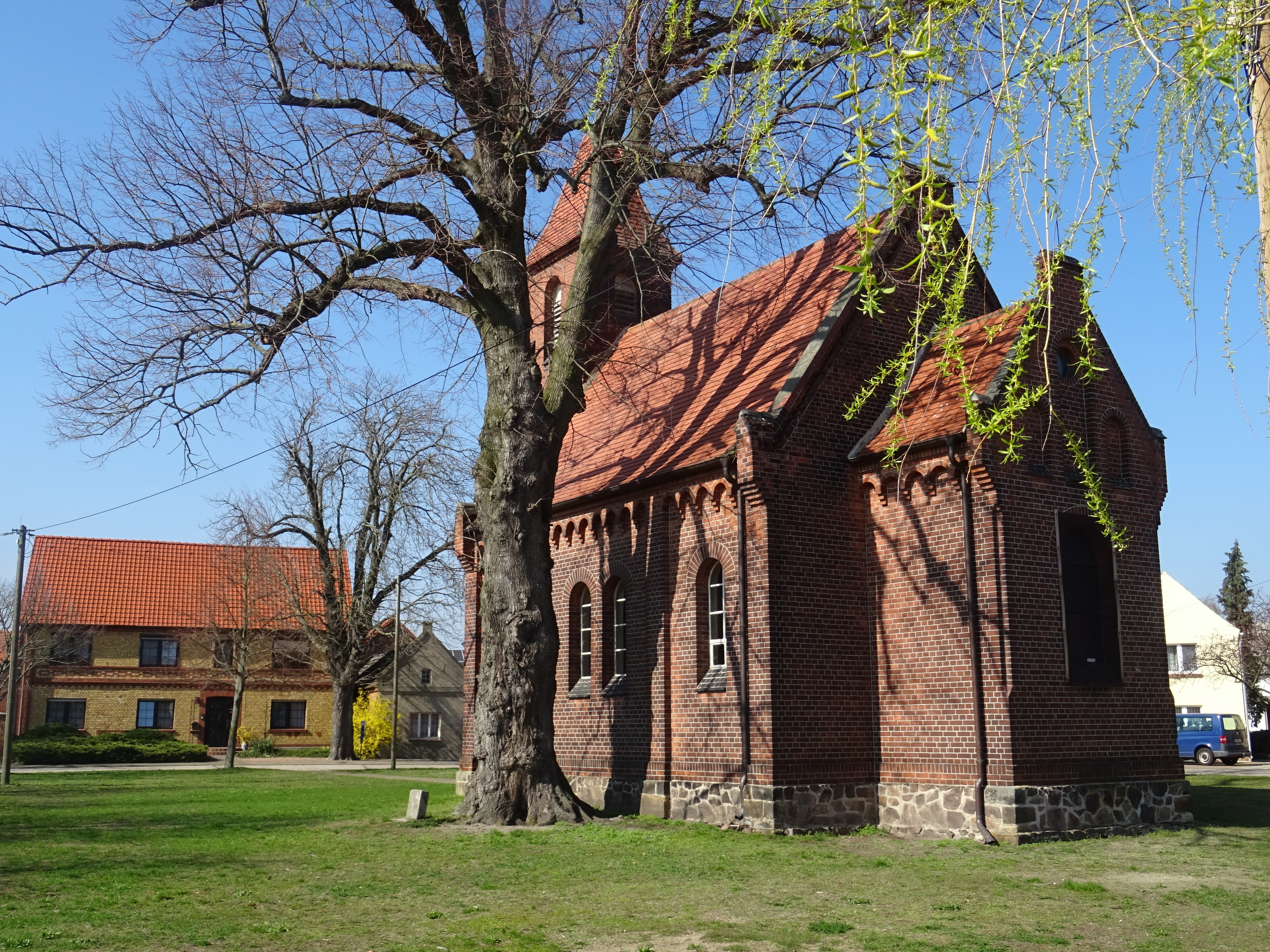 Zemnick, Ortsteil von Zahna-Elster, Dorfkirche von Südosten